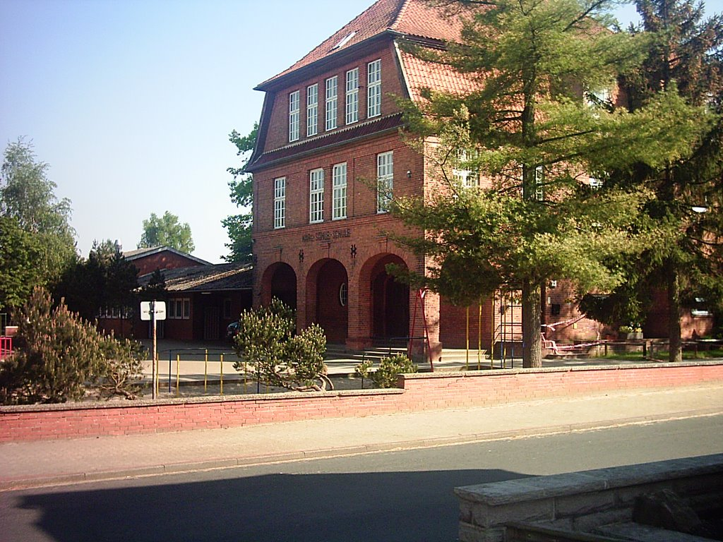 Architektur der Grundschule